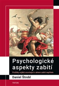 Obálka knihy